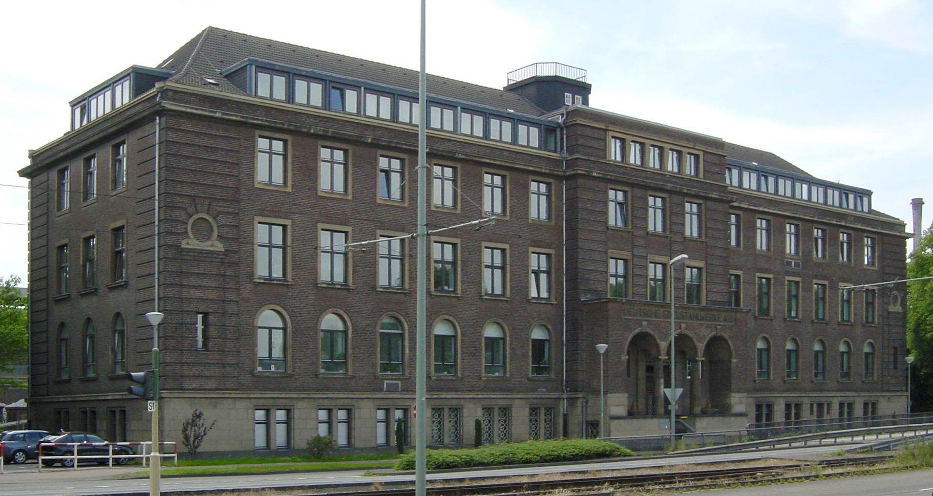 Bildbeschreibung: ThyssenKrupp alte Betriebsverwaltung, Krefeld Quelle: selbst fotografiert Datum: 18.06.2006 Fotograf/Zeichner: DER UNFASSBARE